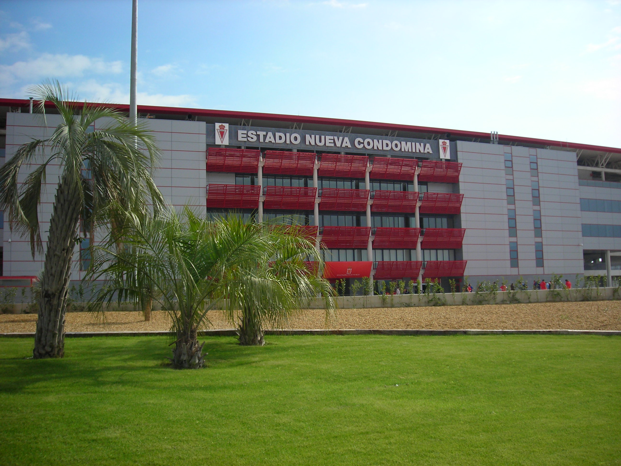 Exterior del estadio Nueva Condomina (Murcia)